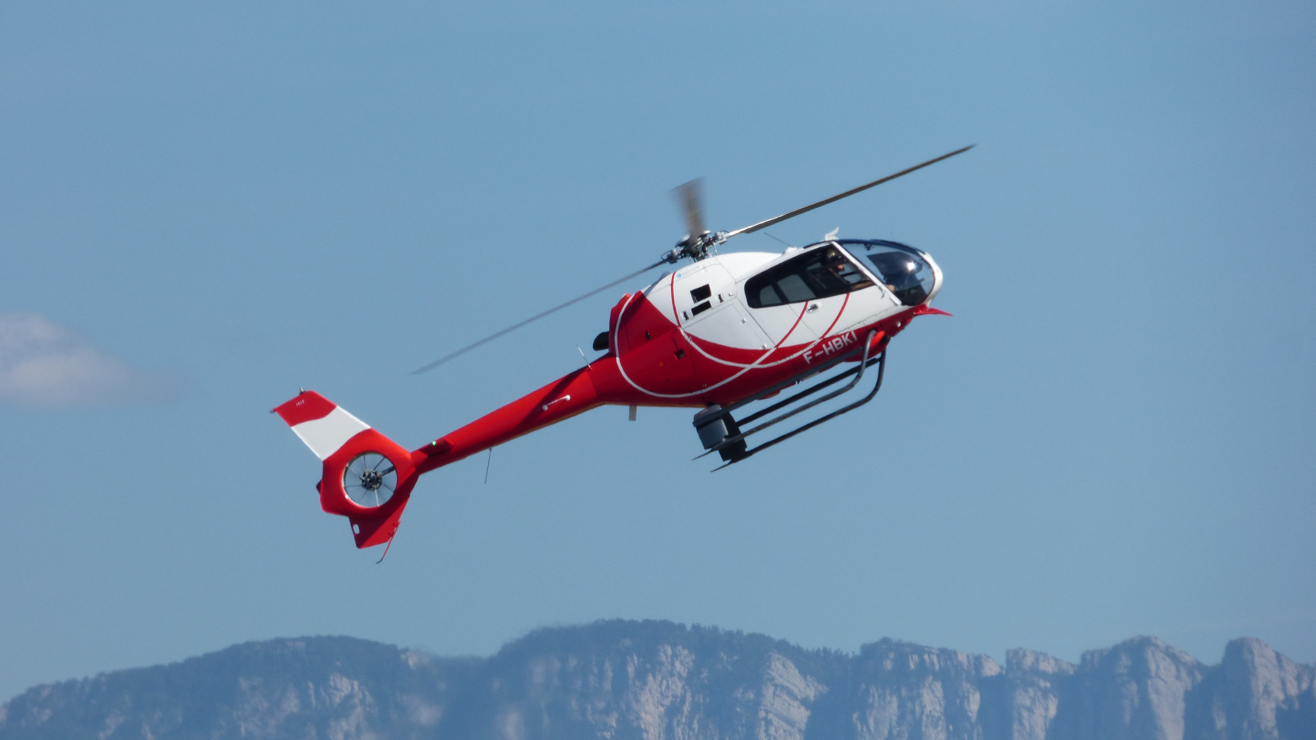 Opération portes ouvertes à l’aéroport de Valence-Chabeuil (Drôme - France) pour les 60 ans de l'ALAT. Ici, un Colibri de l’école de l'aviation légère de l'armée de Terre.